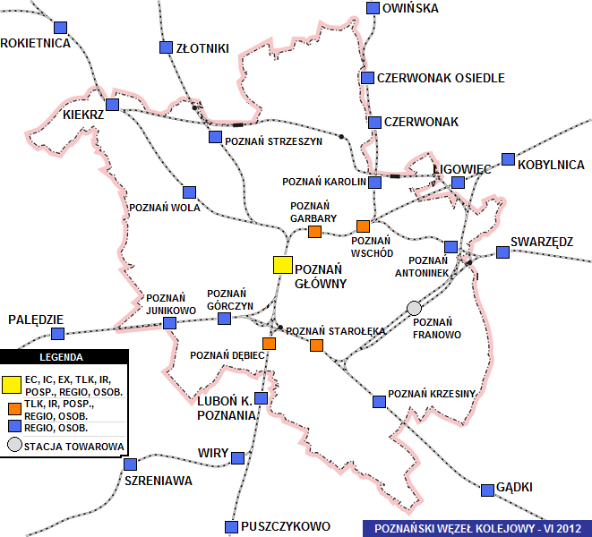 Poznański Węzeł Kolejowy - czynne stacje i przystanki (stan w czerwcu 2012 r.)